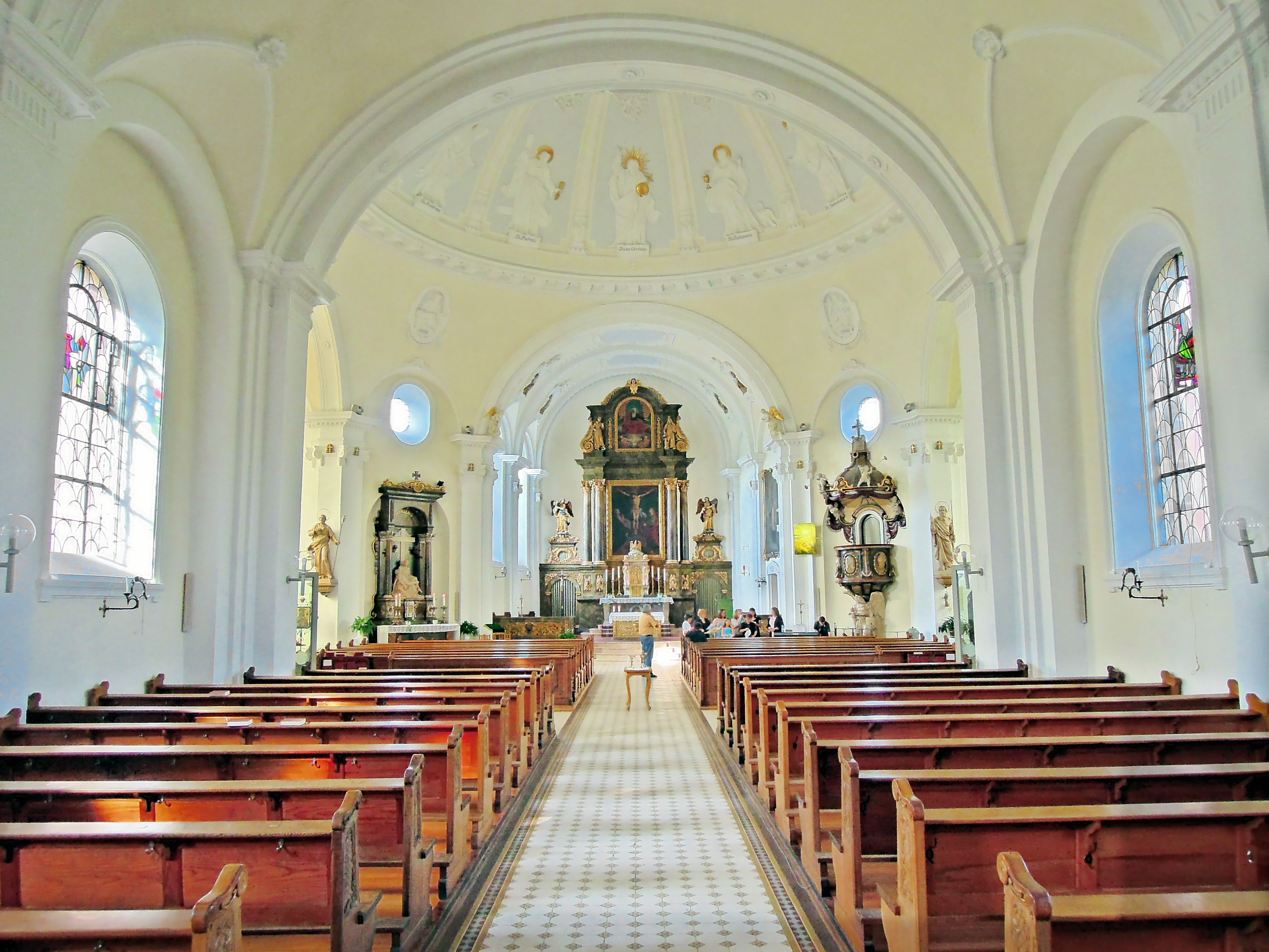 Dechantstraße, kath. Pfarrkirche St. Martin, 1758, 1912 Erweiterung von Peter Marx (Einzeldenkmal))